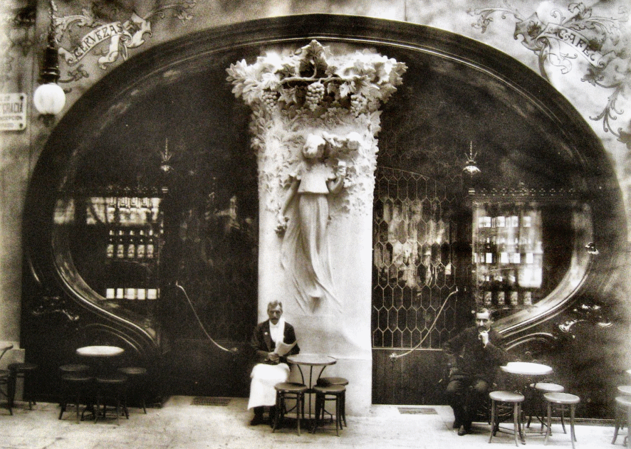 Entrada al Bar Torino (1907).